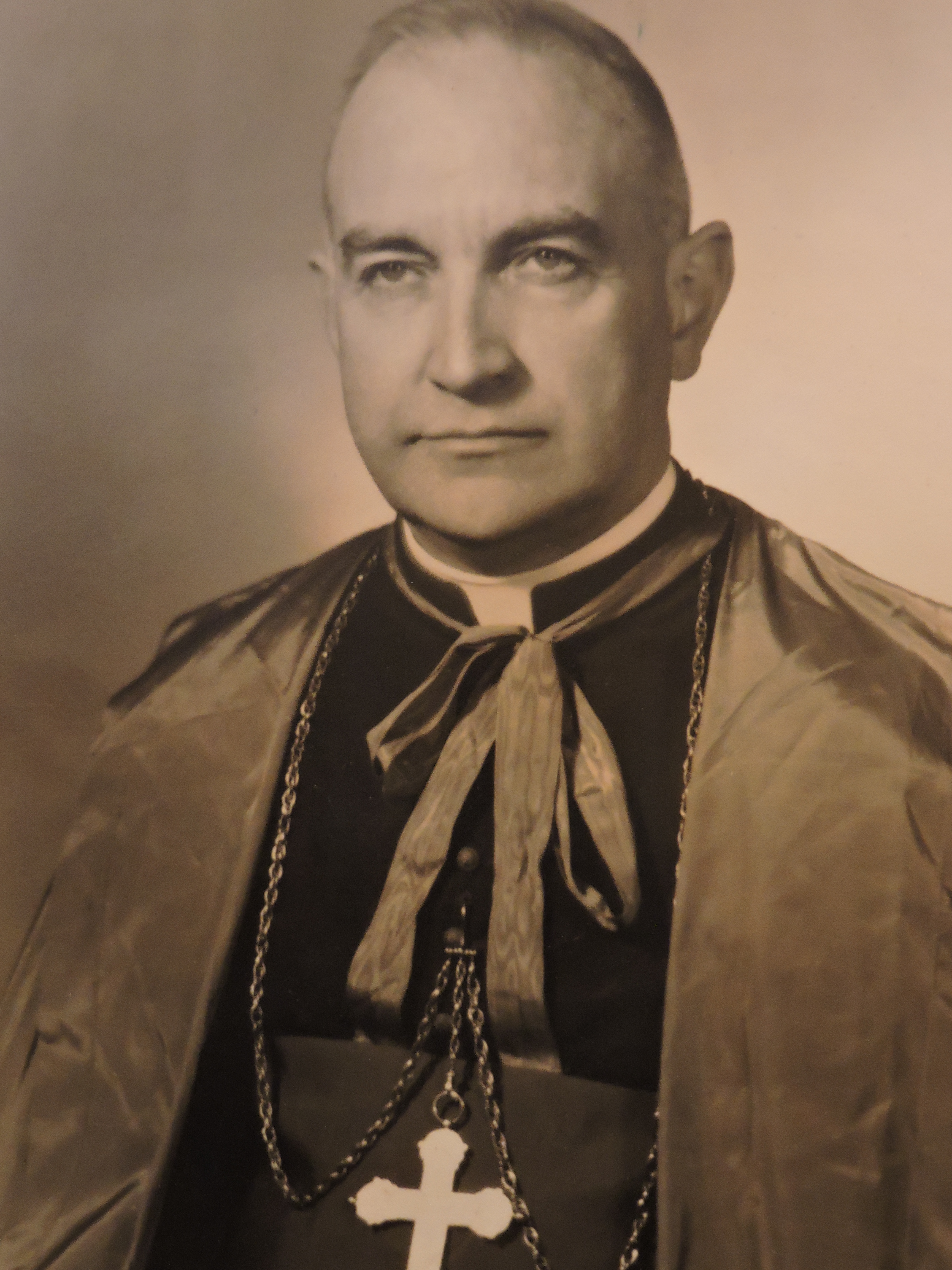 Primeiro Bispo da Diocese de Petrópolis.